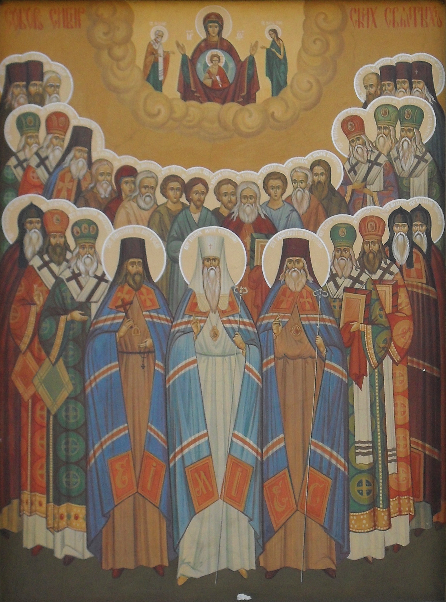 Иркутск. Знаменский женский монастырь. 1757 г. Икона, на западной стене собора, изображающая Собор сибирских святых.